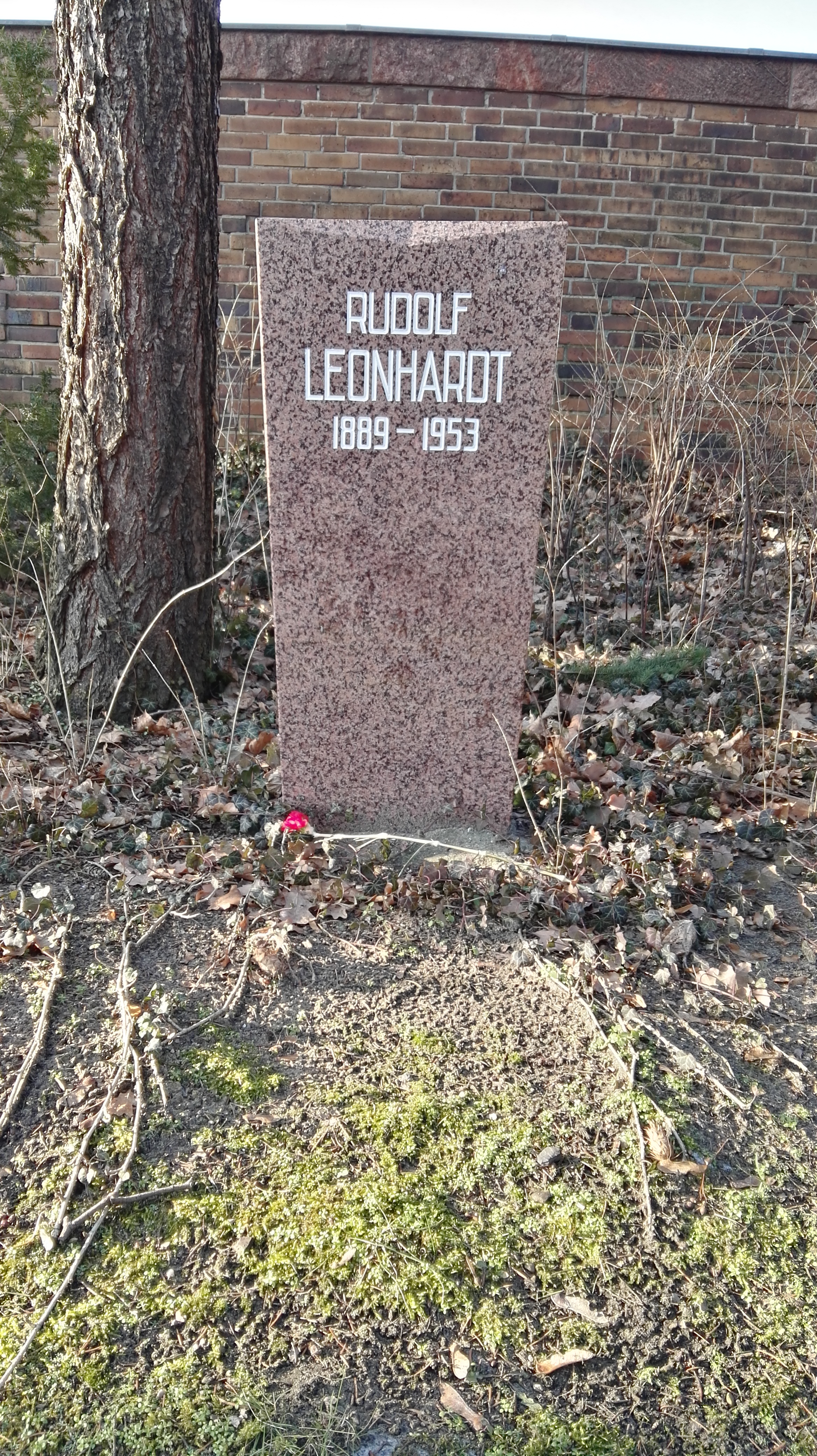 Grab von Rudolf Leonhard in der Grabanlage Pergolenweg auf dem Sozialistenfriedhof des Zentralfriedhofs Friedrichsfelde